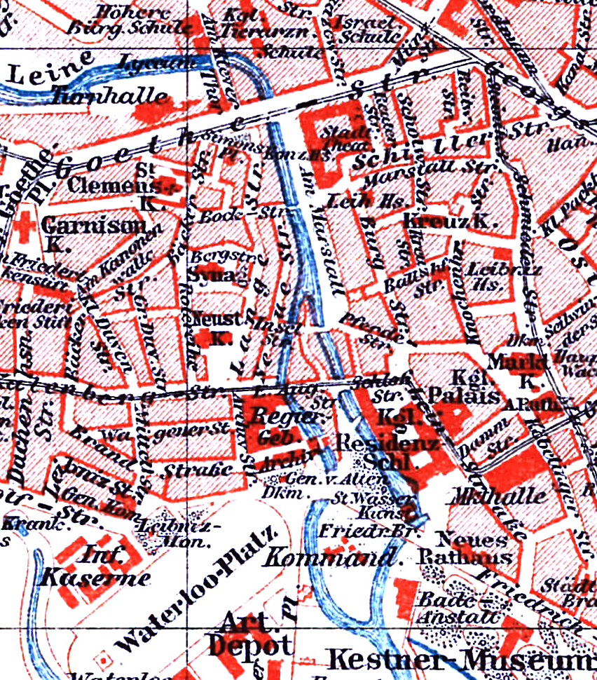 Ausschnitt für die Darstellung der beiden Arme der Leine (Brückmühlenarm und historischer Verlauf) und der Straßenzüge auf der Leineinsel Klein-Venedig, hier aus dem Stadtplan Hannover aus Meyers Konversationslexikon, 5. Auflage, Band 8 Seite 350f. ...